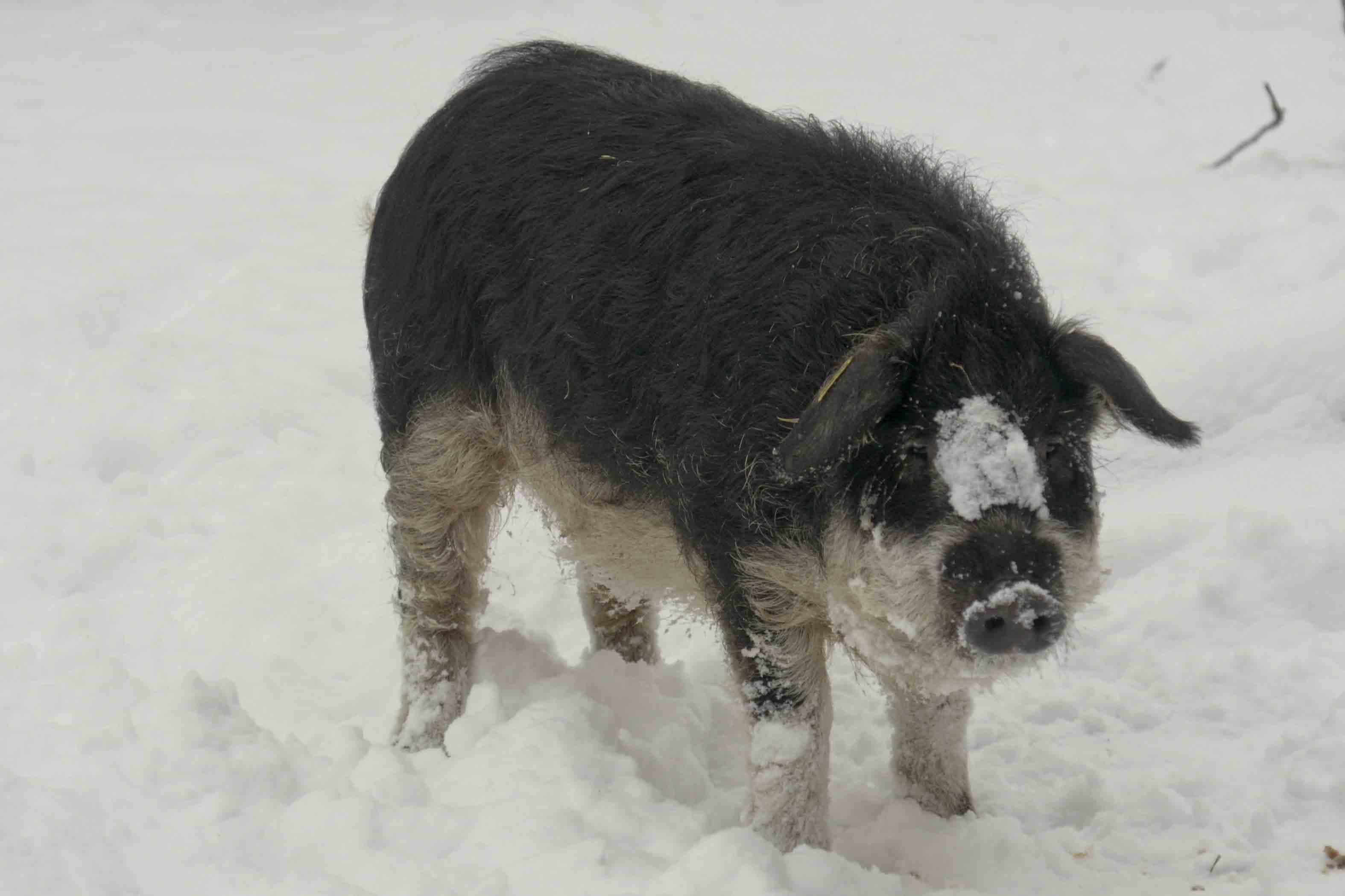 Mangalica, Wollschwein, Eber